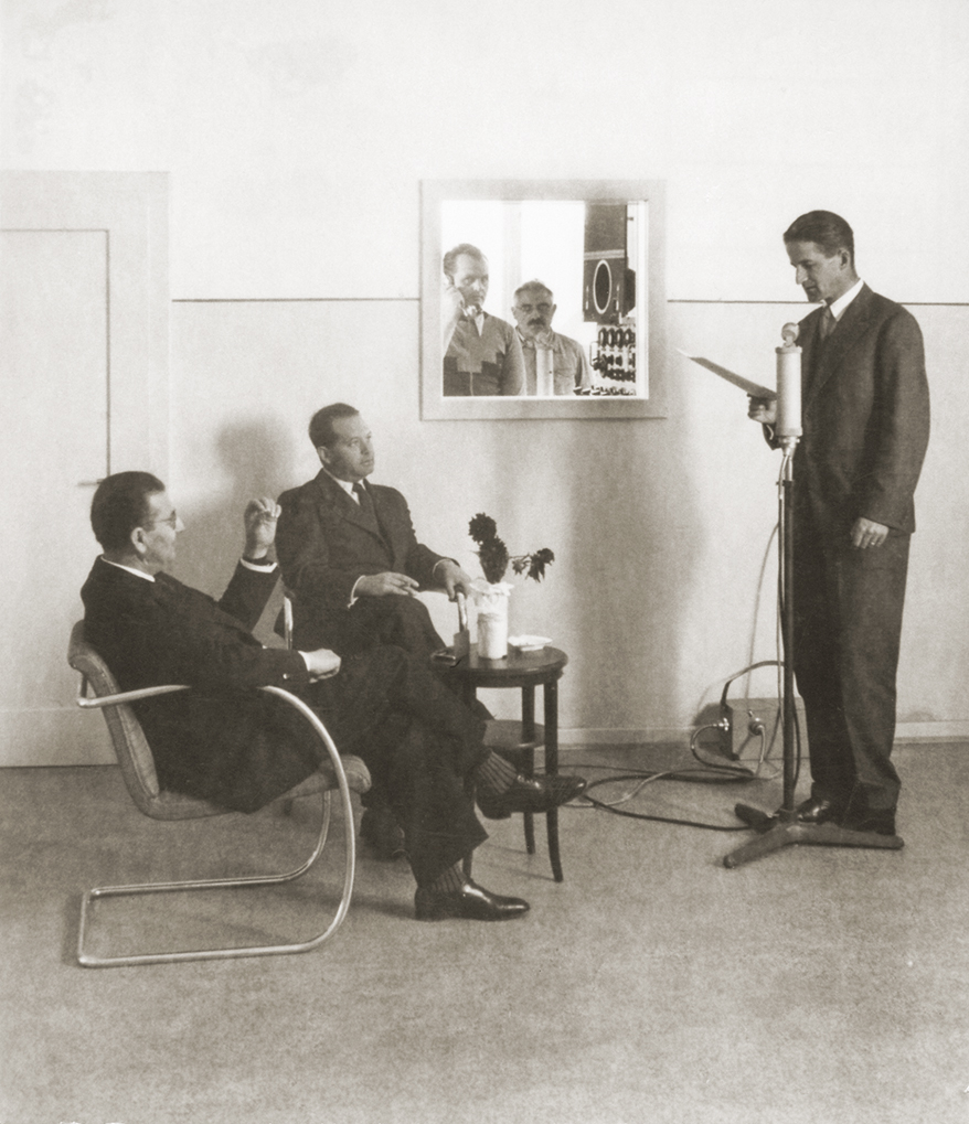 Liechtensteinischer Landessender, erster liechtensteinischer Radiosender. Am Mikrofon der Sendeleiter Friedrich Ritter